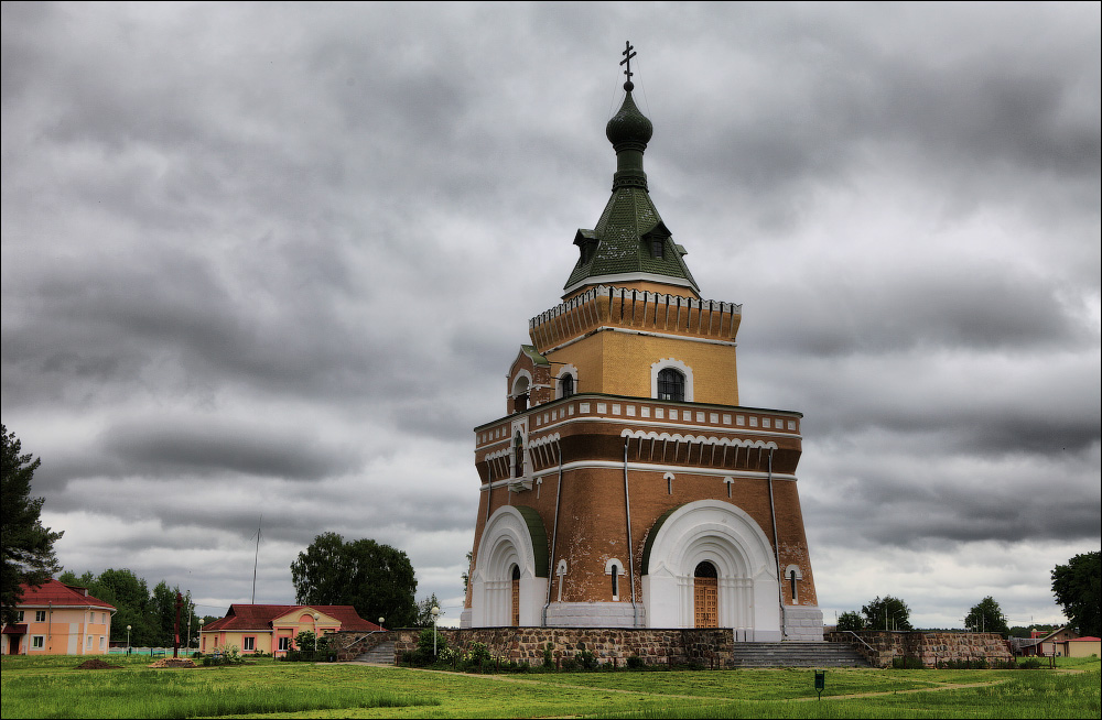 Лясная. Свята-Петра-Паўлаўскі храм-помнік